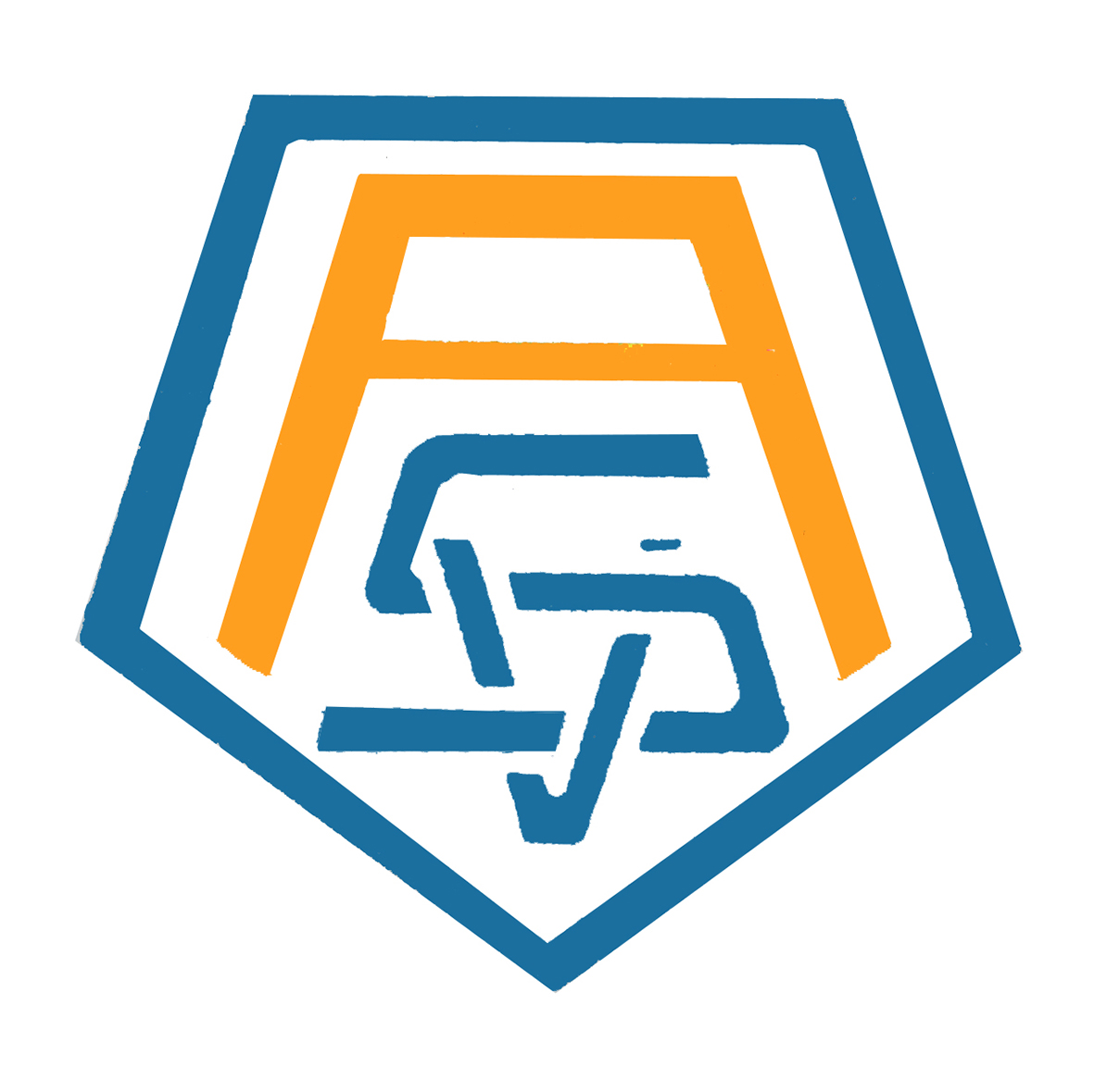 Das Gründungswappen des S. V. Arnstadt aus dem Jahr 1905